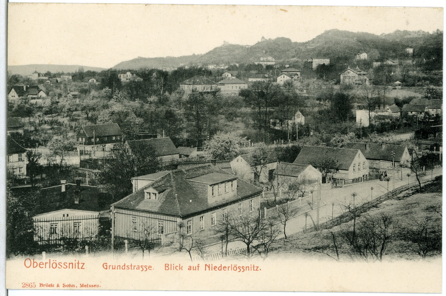 Oberlößnitz; Grundstraße mit Blick auf Niederlößnitz This postcard is from publisher Brück & Sohn in Meißen ( postcard has a unique number 02865 and is available in a higher resolution at the publisher. This images was uploaded in a cooperation project between Wikipedians and the publisher.